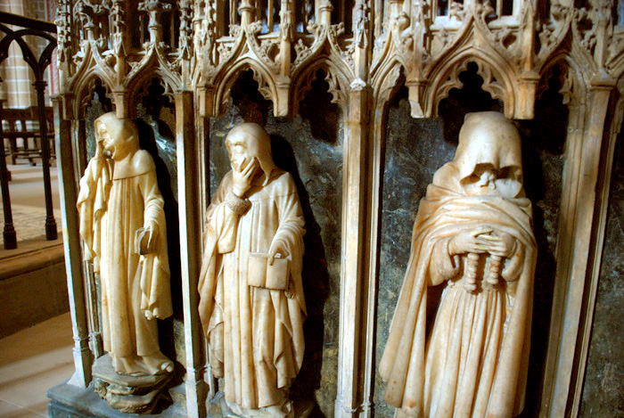 plorantes